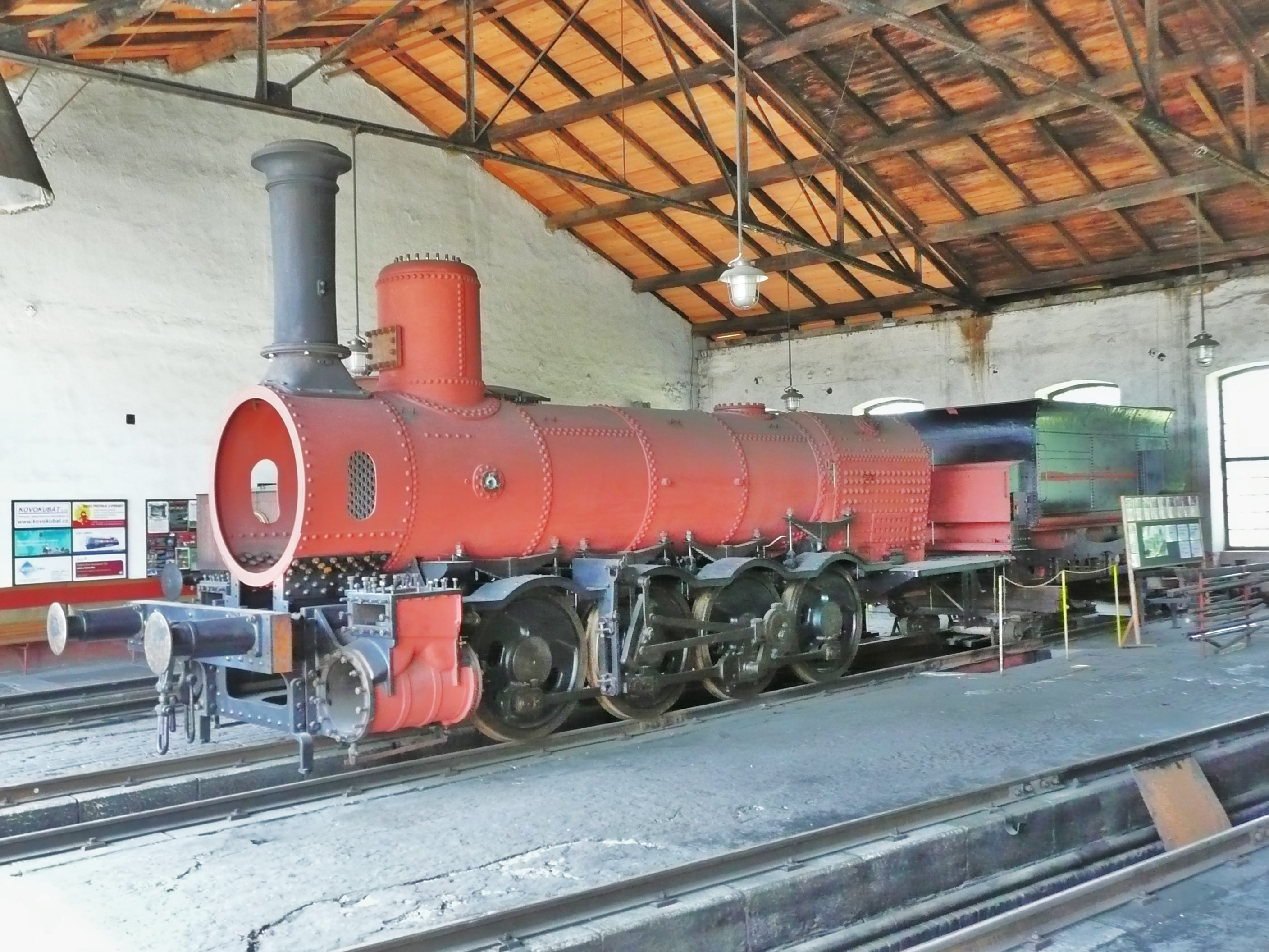 411.019 beim Wiederaufbau im Heizhaus Jaromer